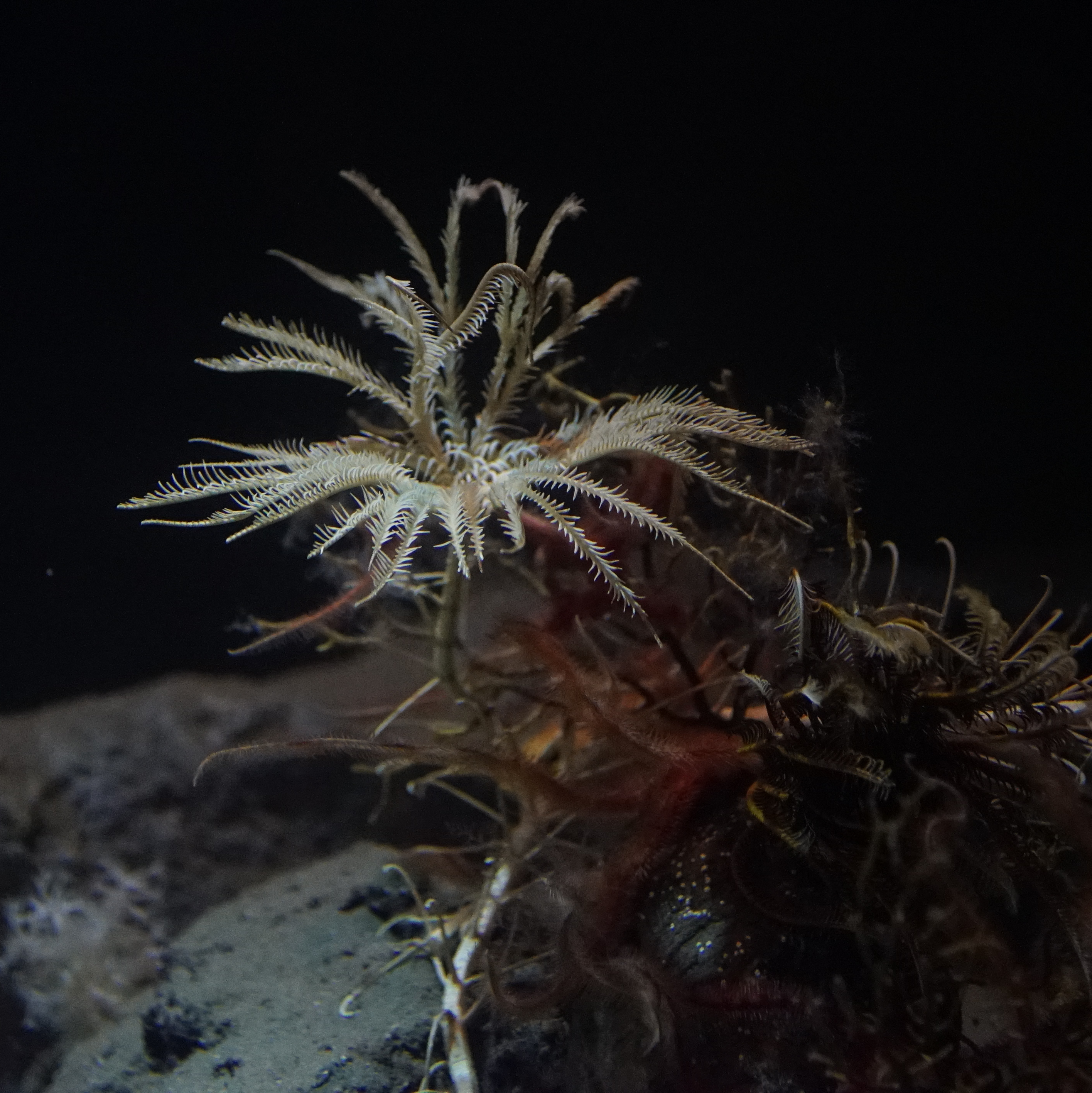 トリノアシ Japanese sea lily Domain: Eukaryota • Regnum: Animalia • Phylum: Echinodermata • Subphylum: Crinozoa • Classis: Crinoidea • Ordo: Isocrinida • Familia: Isselicrinidae • Genus: Metacrinus Wikispecies has an entry on: Metacrinus rotundus. Species Metacrinus rotundus Carpenter, 1885 動物界 棘皮動物門 ウミユリ網 ゴカクウミユリ目 Isselicrinidae科 トリノアシ属 Location: Tokyo Sea Life Park (Kasai Rinkai Suizokuen), Japan Other photos: NCBI Taxonomy ID:228699 EOL link: Metacrinus rotundus uBio search link: Metacrinus rotundus